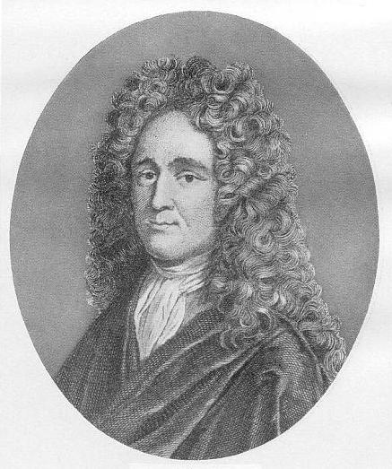 André Dacier (1651–1722), französischer Philologe. Stich von Gaillard, nach einen Gemälde von Ferdinand (aus Drex du Radier, L'Europe illustre V, 1777)